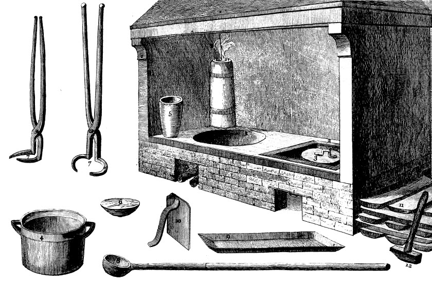 Forno per la fusione della lega tipografica